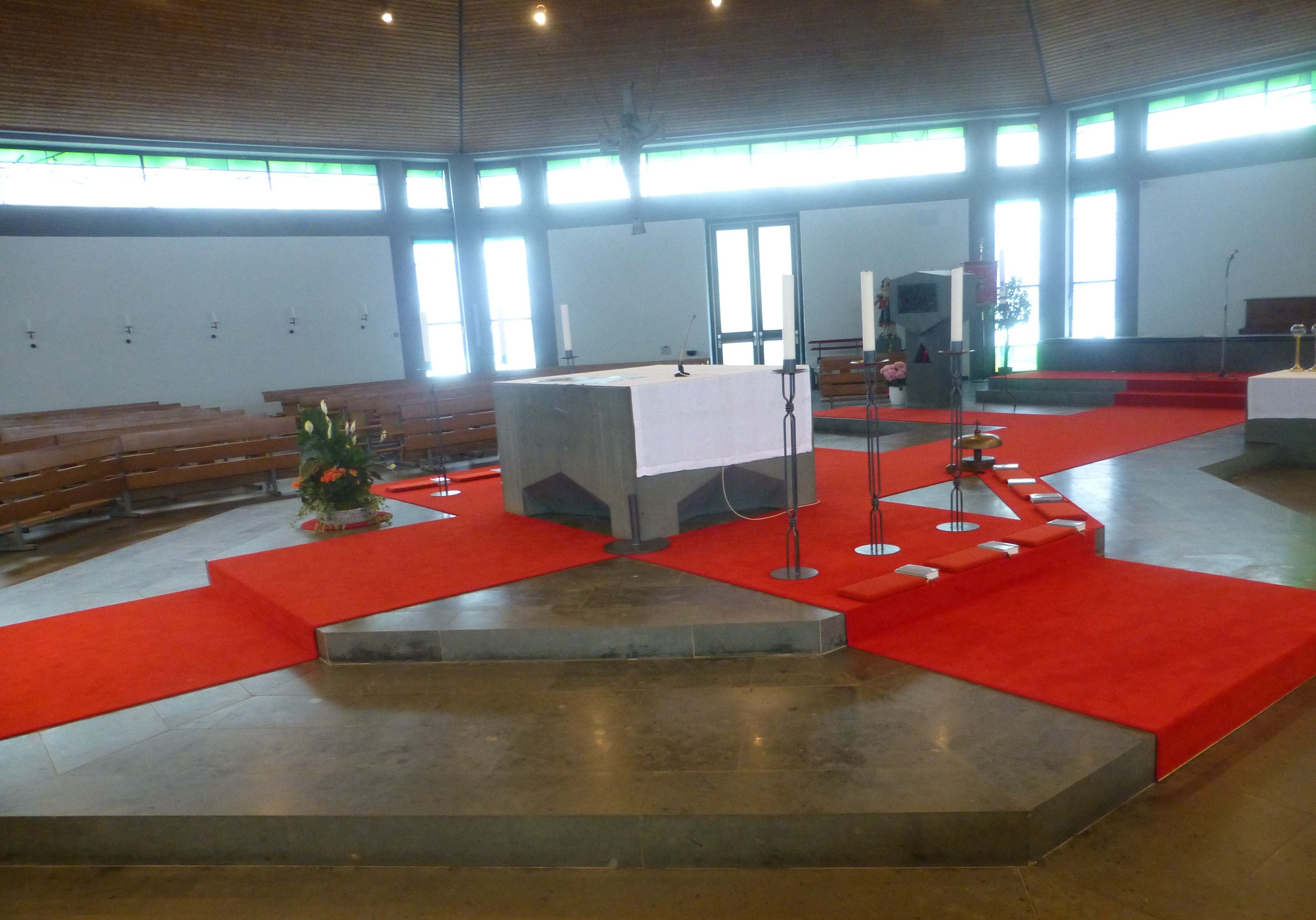 St. Johannes in Lahr: Altar der neuen Kirche